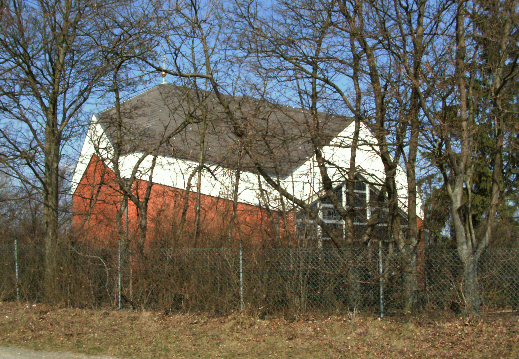 Katholische Kirche Heilig Geist auf dem Heimstattgelände Röderhof bei Egenstedt, Ortsteil von Diekholzen